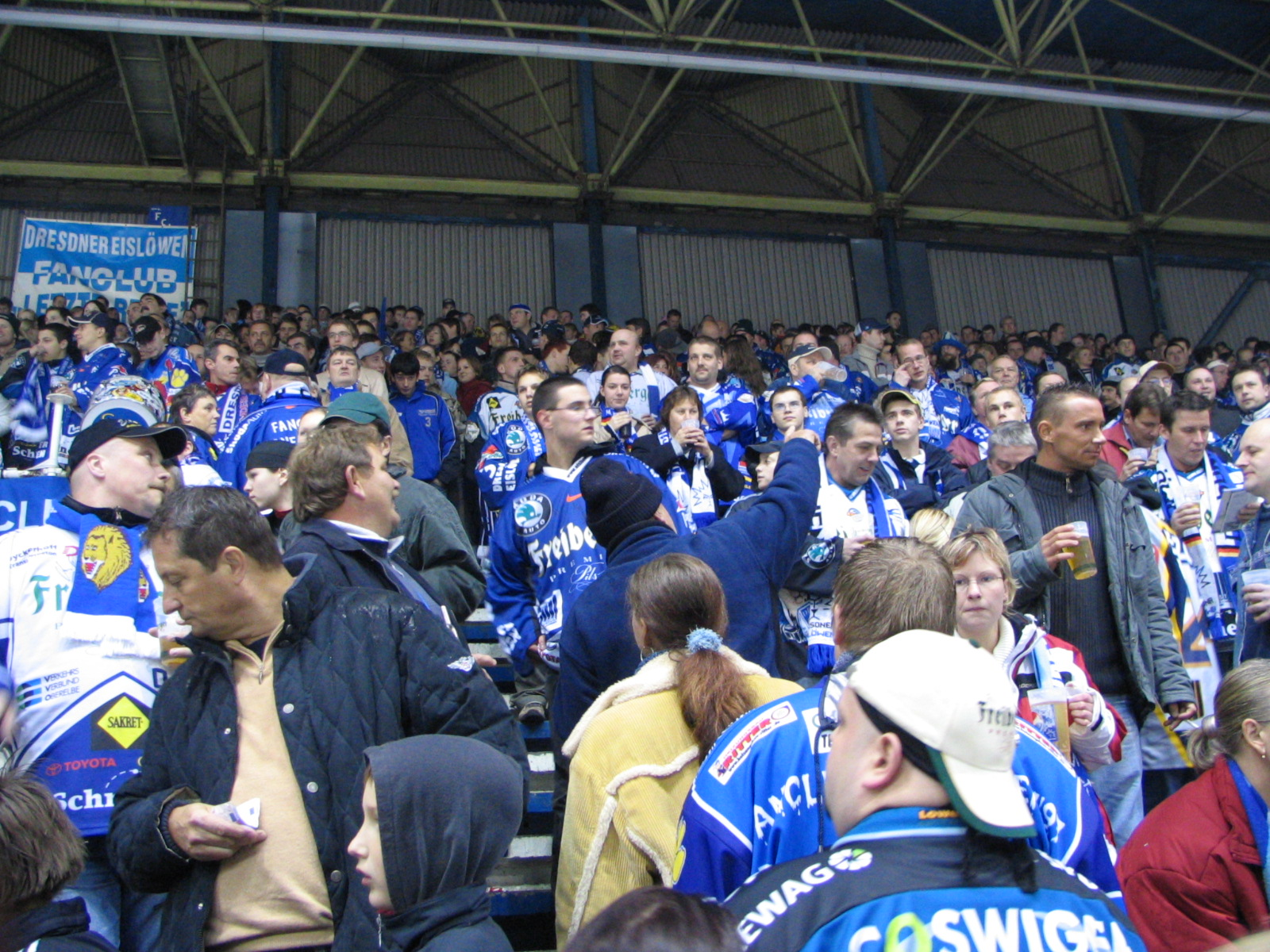 Fans of the Dresdner Eislöwen at Game: Dresdner Eislöwen 3 - 4 Eisbären Regensburg